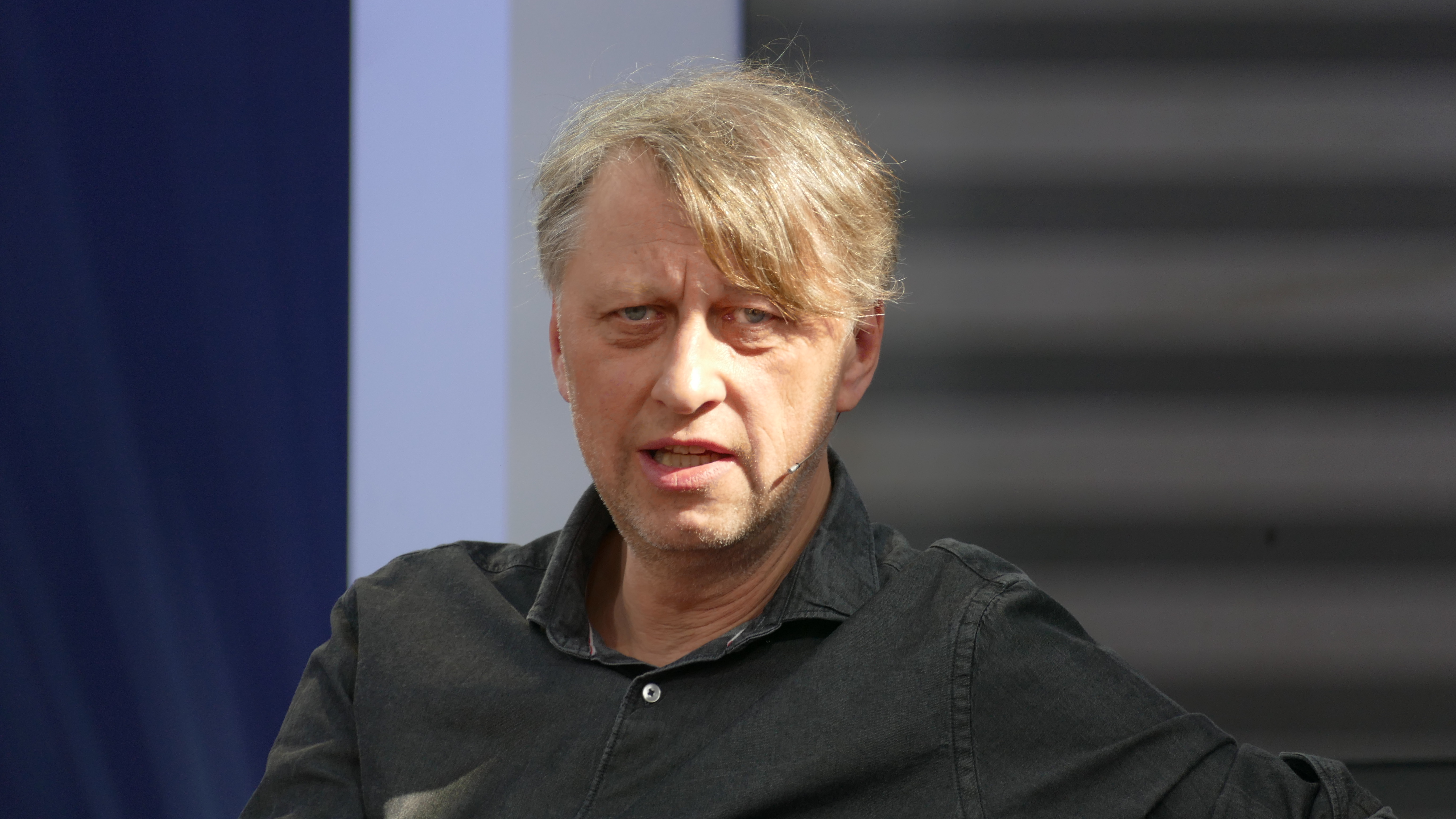 Jáchym Topol auf der Leipziger Buchmesse 2019 bei der Vorstellung seines Romans "Ein empfindsamer Mensch"